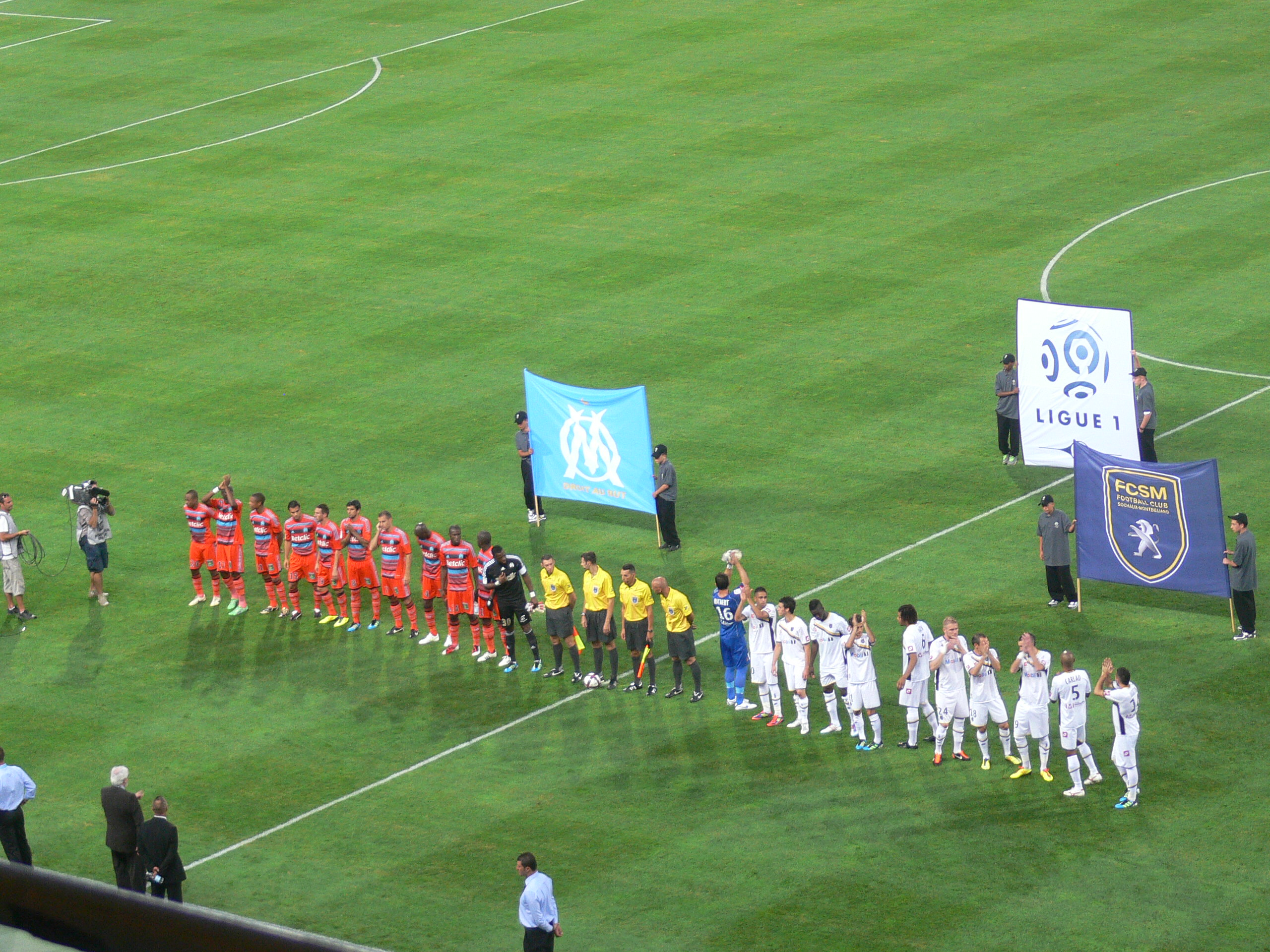 OM-Sochaux le 6 août 2011 (1re journée du championnat de France ligue 1 de football)